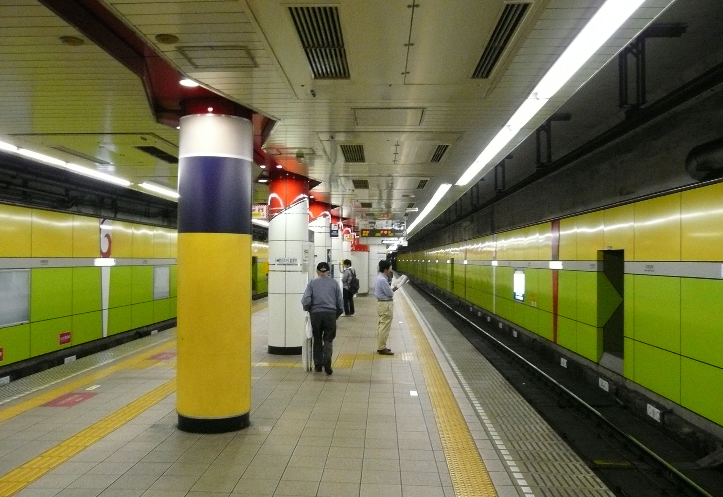 仲御徒町駅ホーム